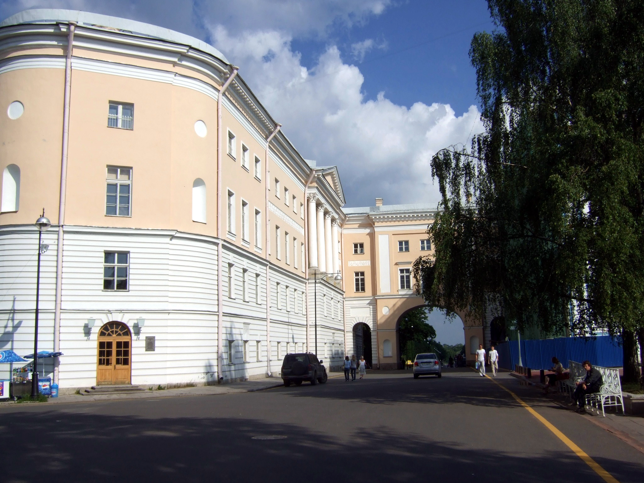 Tsarskoye Selo Lyceum